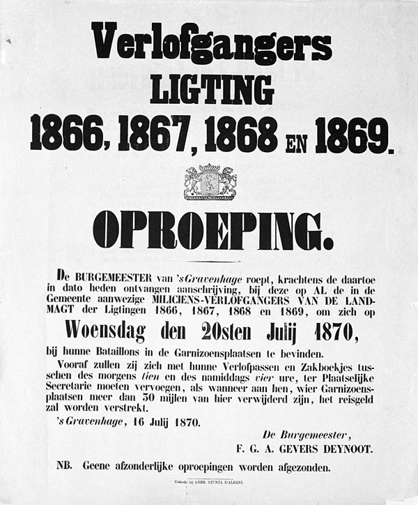 Affiche waarop soldaten van verschillende lichtingen worden opgeroepen voor mobilisatie